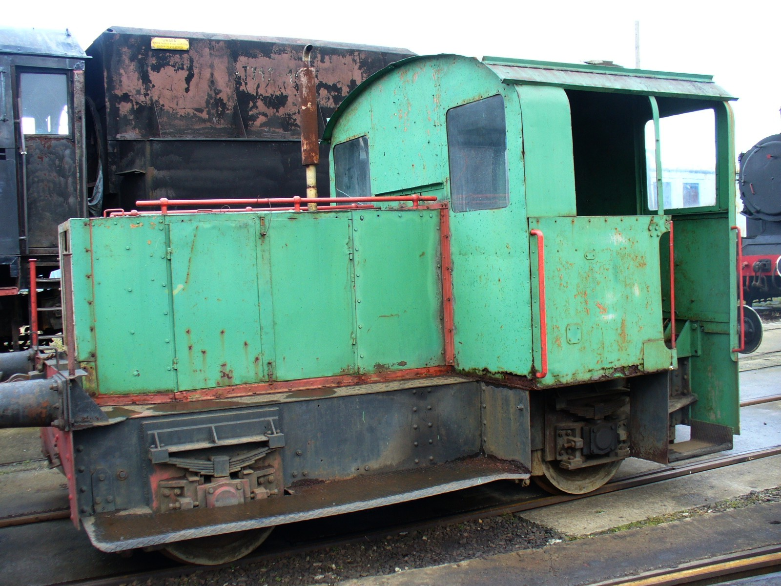 Lokomotywa spalinowa Kö 0130 - skansen w Pyskowicach